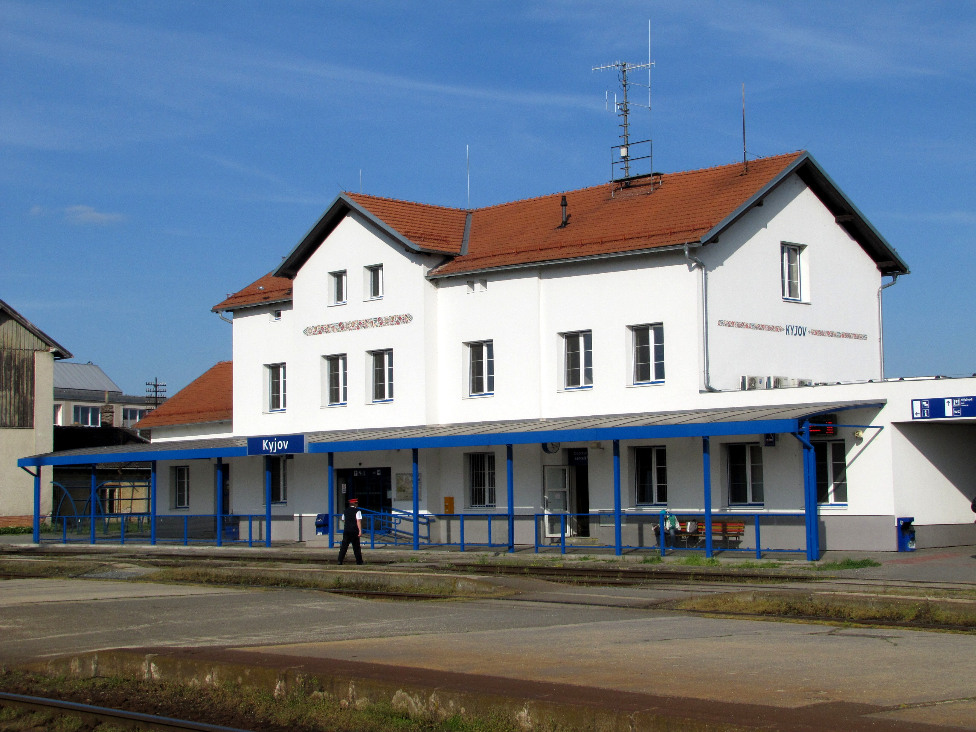 Železniční stanice v Kyjově